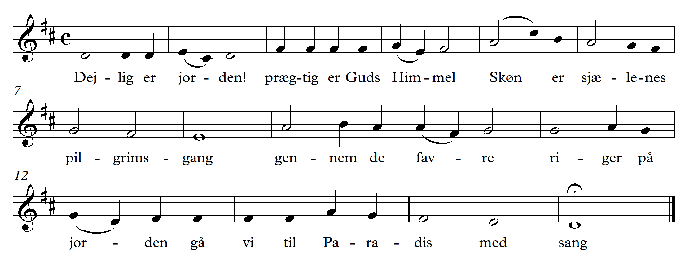 Melodi til jule- og begravelsessamle